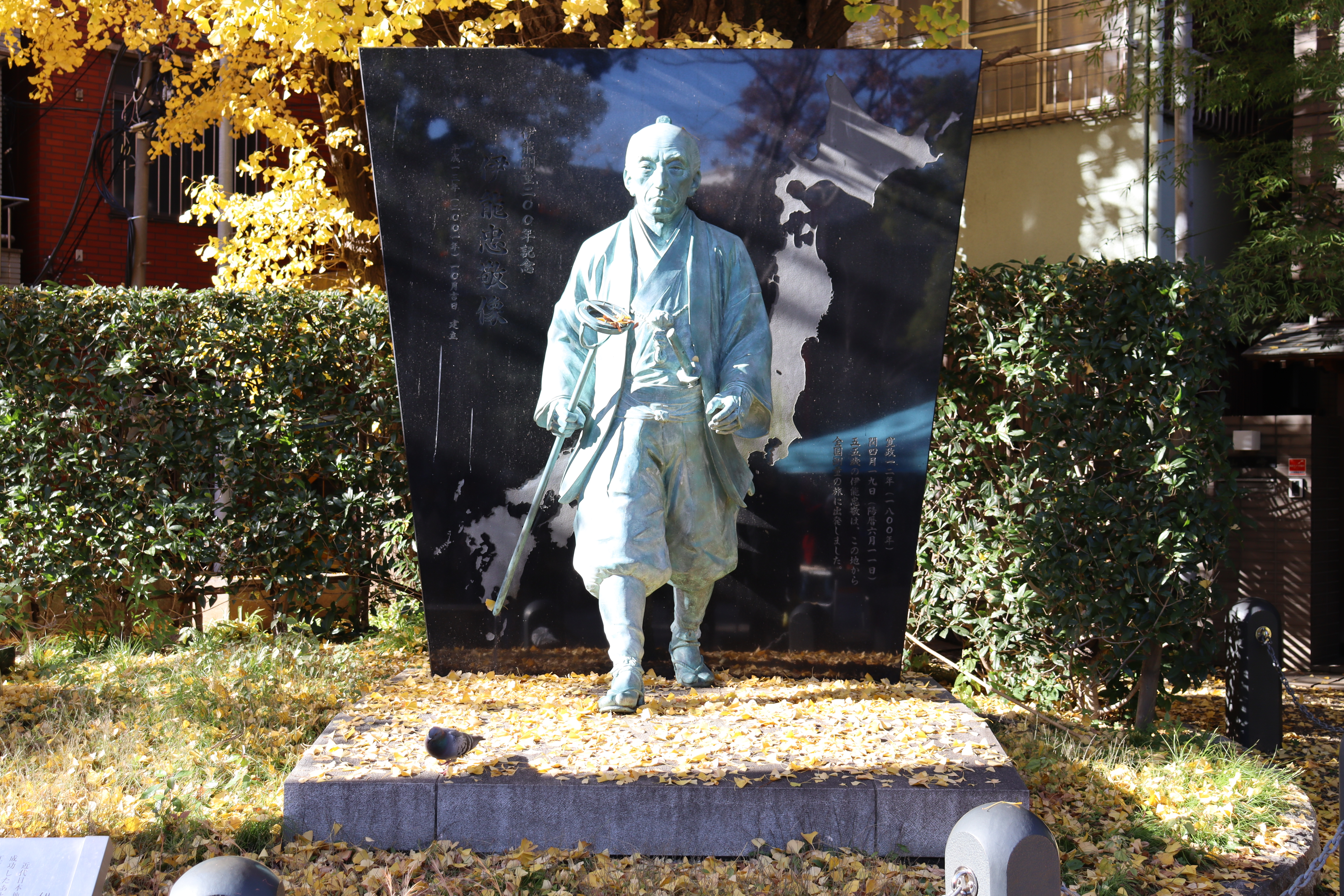 中文（香港）: 伊能忠敬像